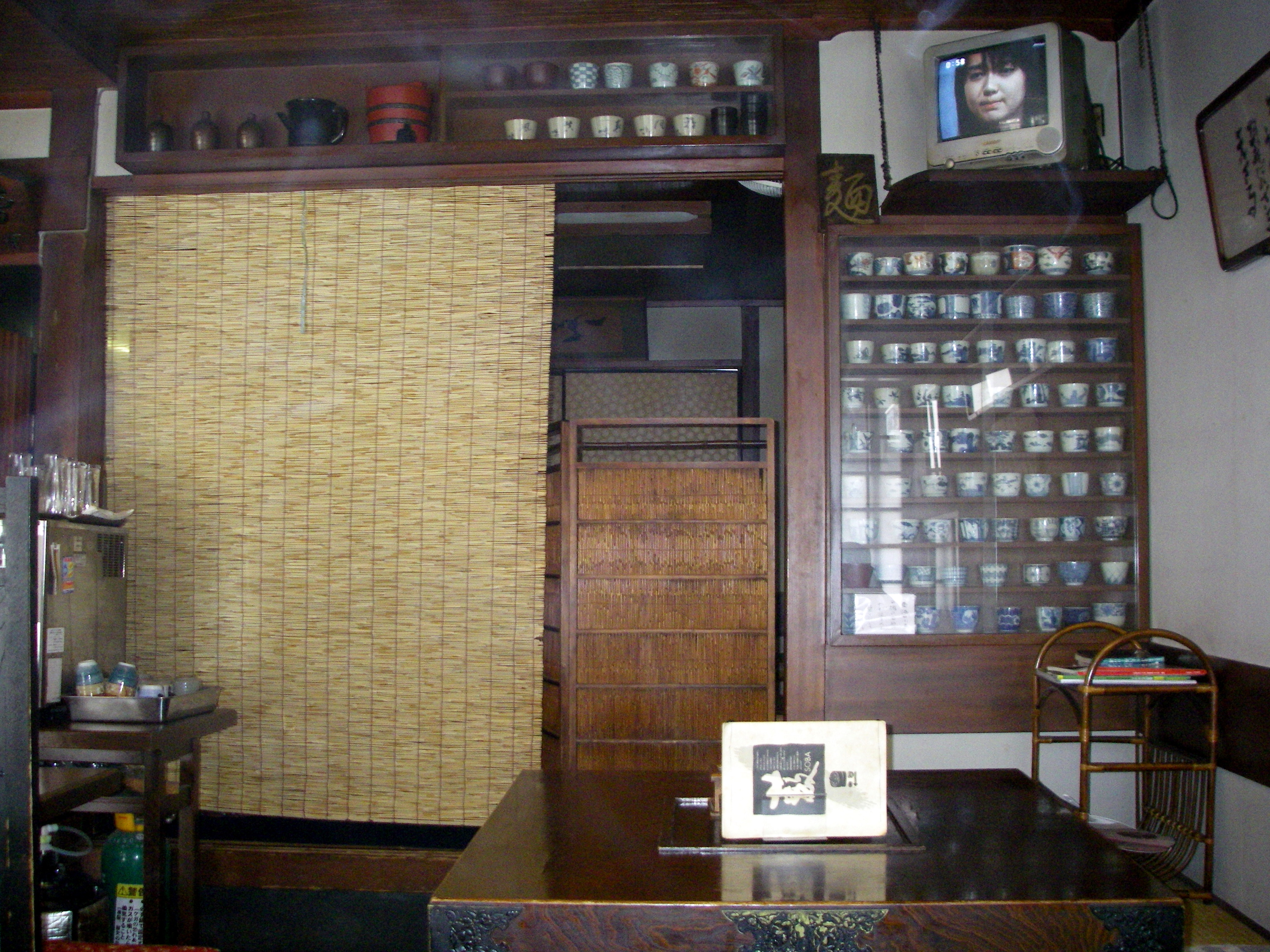 つばさ 第24週 『あなたを守りたい』 第142回 玉木 つばさ (Tamaki Tsubasa) - 多部 未華子 @ 京都 藪そば